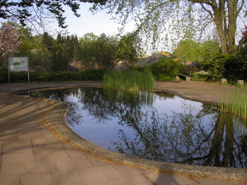 Froschteich im Botanischen Garten der Universität Mainz / Botanical Garden at the University of Mainz, Germany